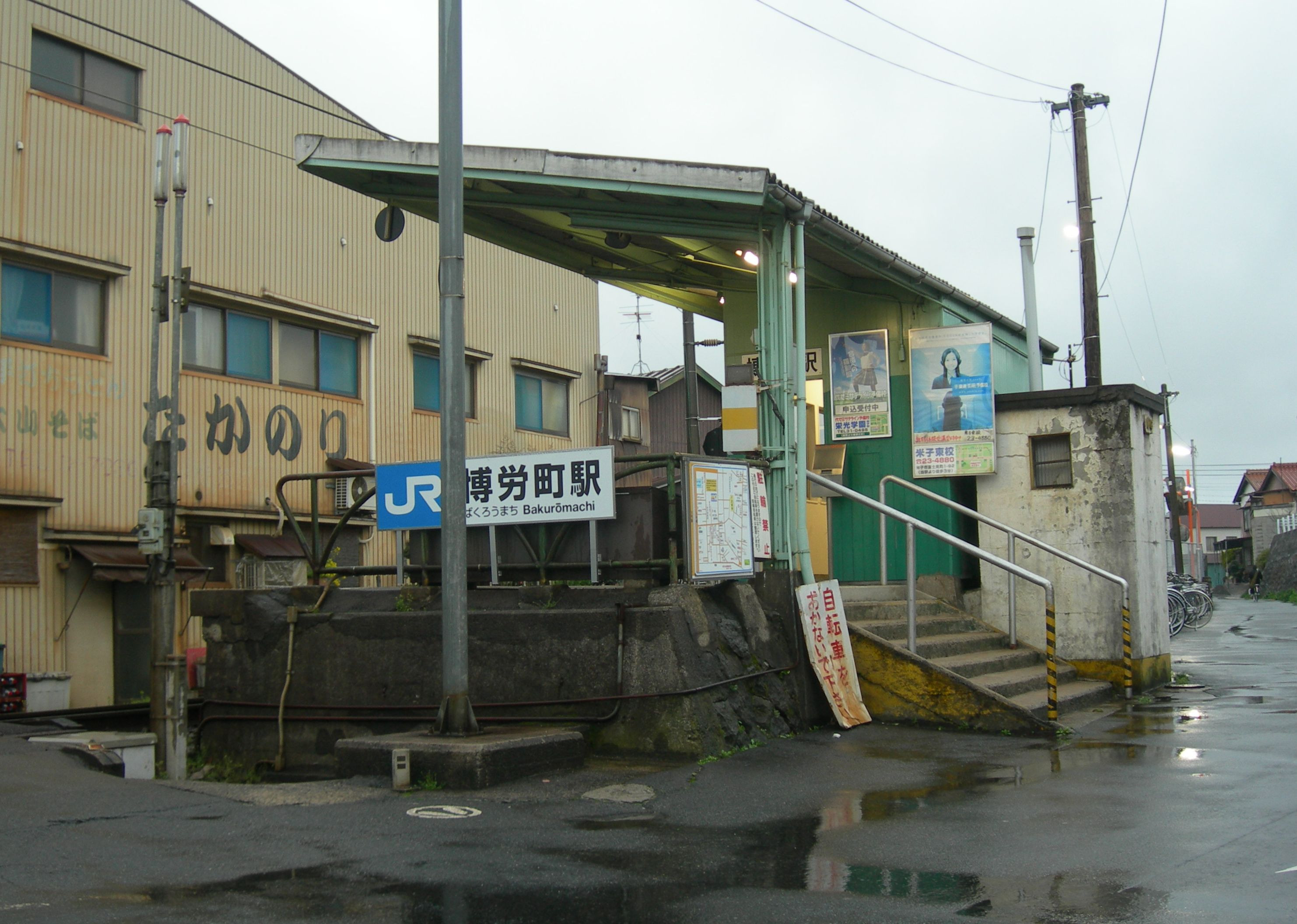 博労町駅